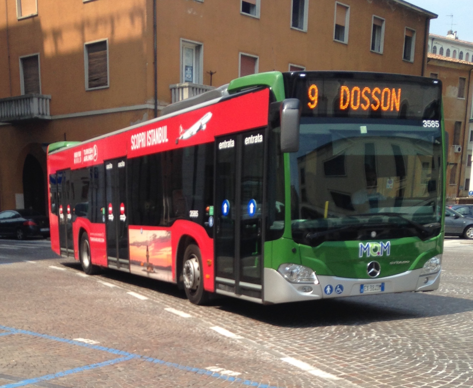 Autobus 3585 Mercedes-Benz Citaro O530BZ di MOM-Mobilità di Marca (ex ACTT) Treviso, presso Piazza Pio X in Treviso, in servizio urbano sulla Linea 9, diretto a Dosson, Capolinea via Torricelli, per via Aldo Moro.